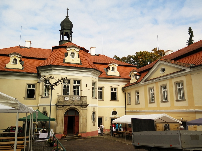 Zámek Domousnice, Domousnice 1, Domousnice.